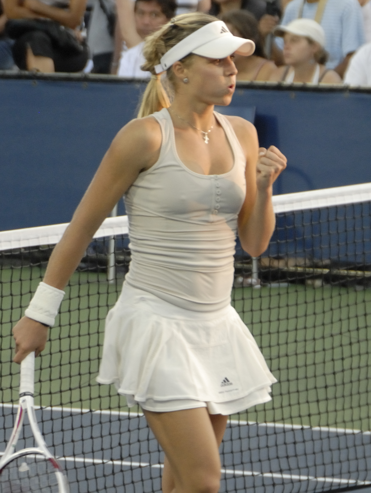 Maria Kirilenko at 2008 US Open